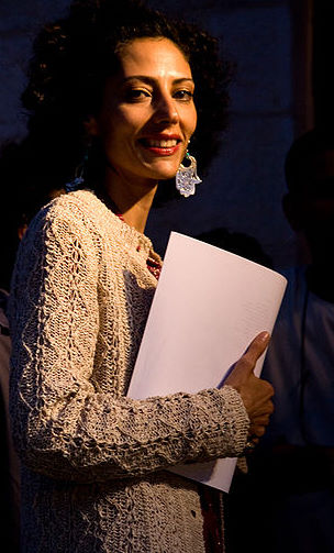 Suheir Hammad